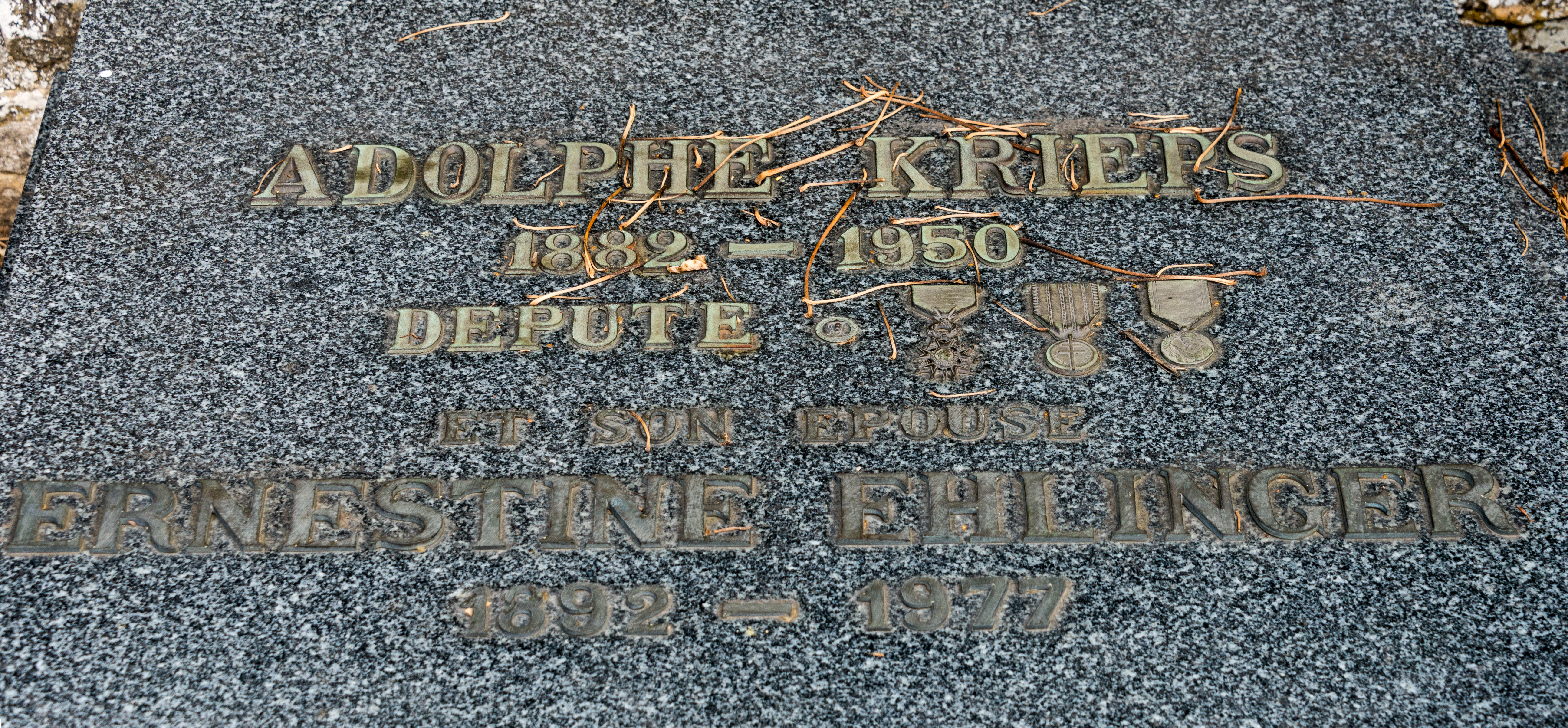 D'Graf Adolphe Krieps um Nikloskierfecht.